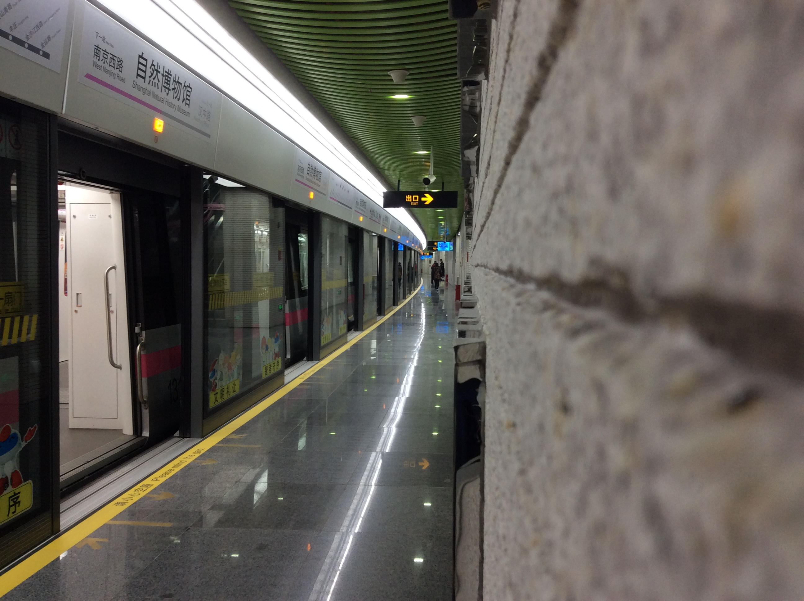 2015121913号线自然博物馆站